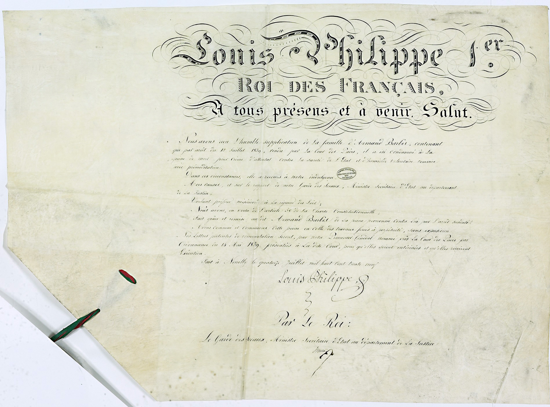 Grâce accordée à Armand Barbès par le roi Louis-Philippe après sa condamnation à mort